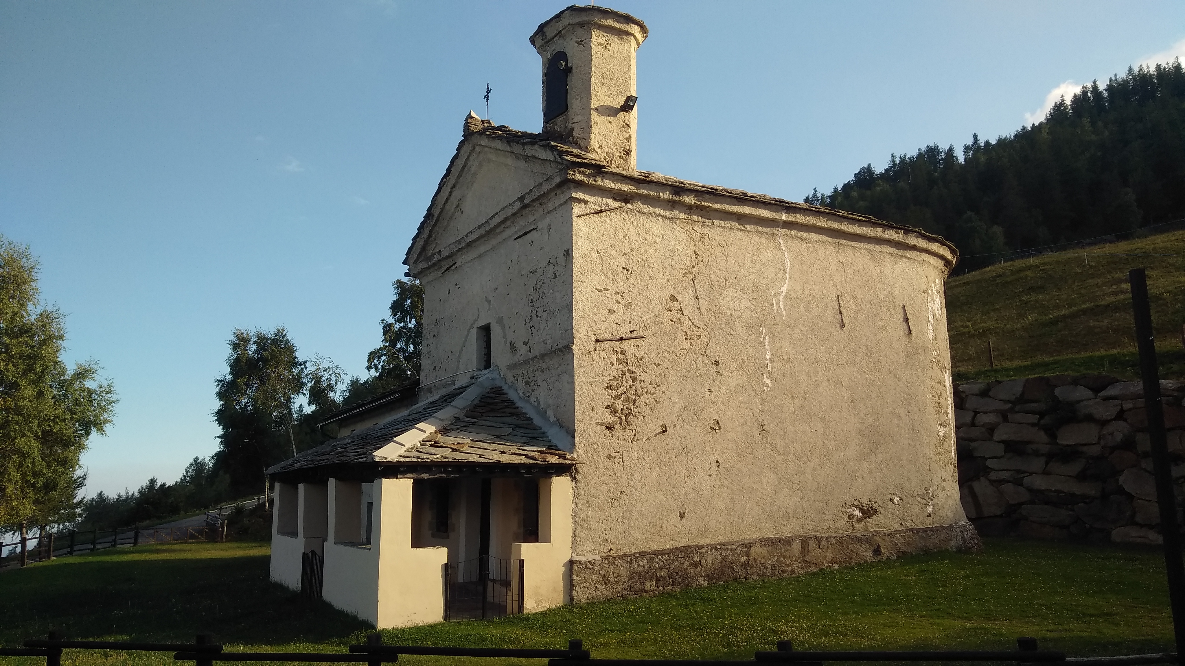 Tavagnasco Santa Maria Maddalena